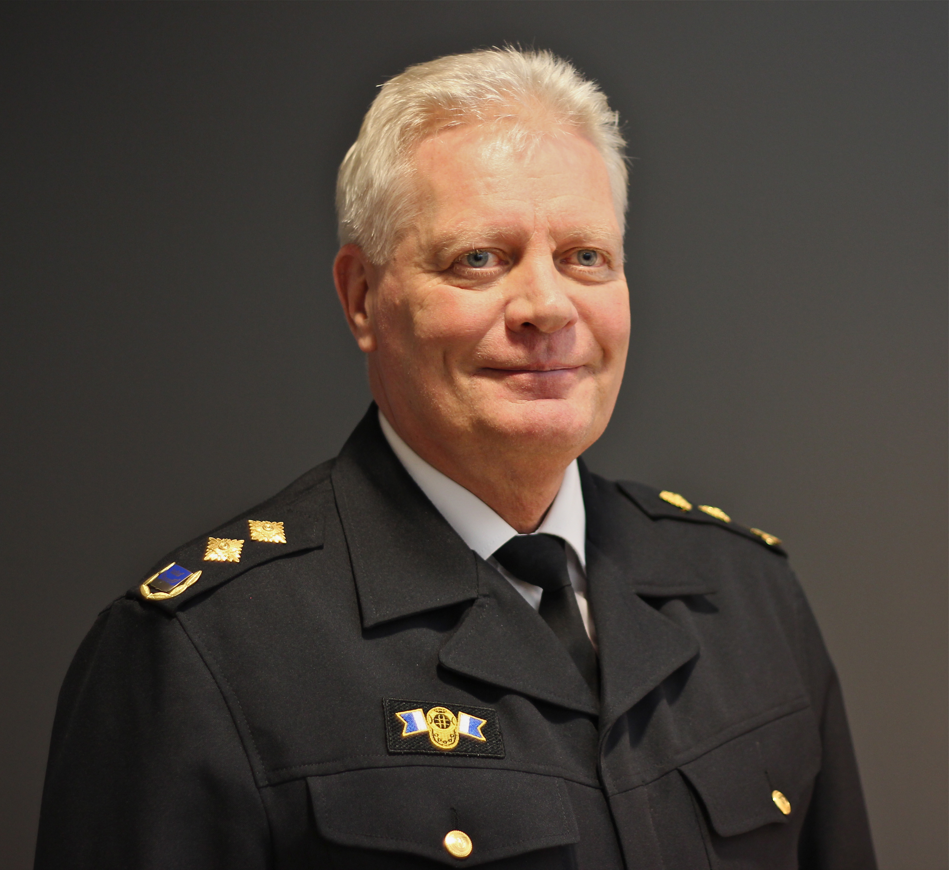 Pelastuskomentaja Simo Weckstén